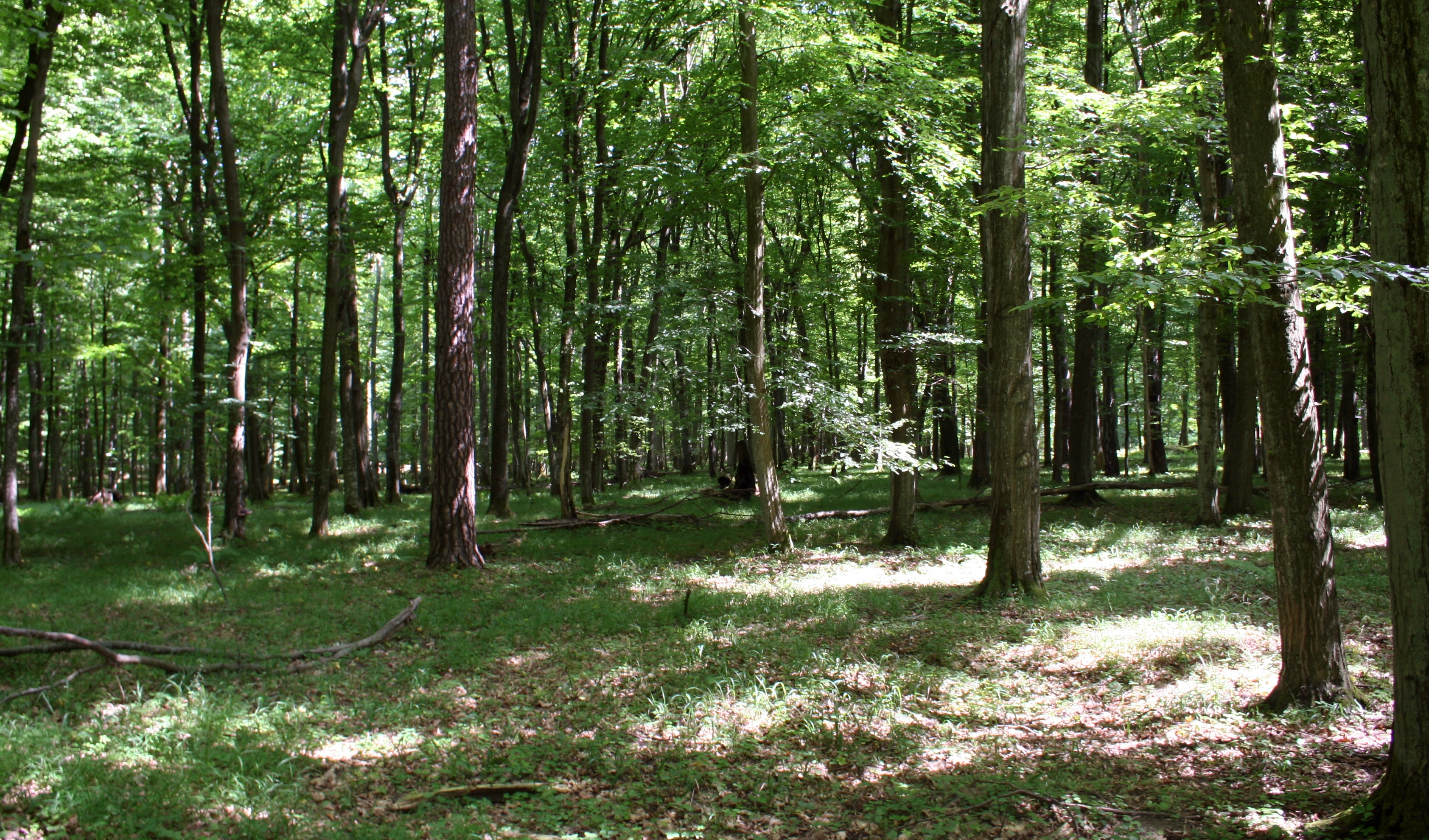 Rezerwat Brzęki (fragment) we Wdeckim Parku Krajobrazowym.